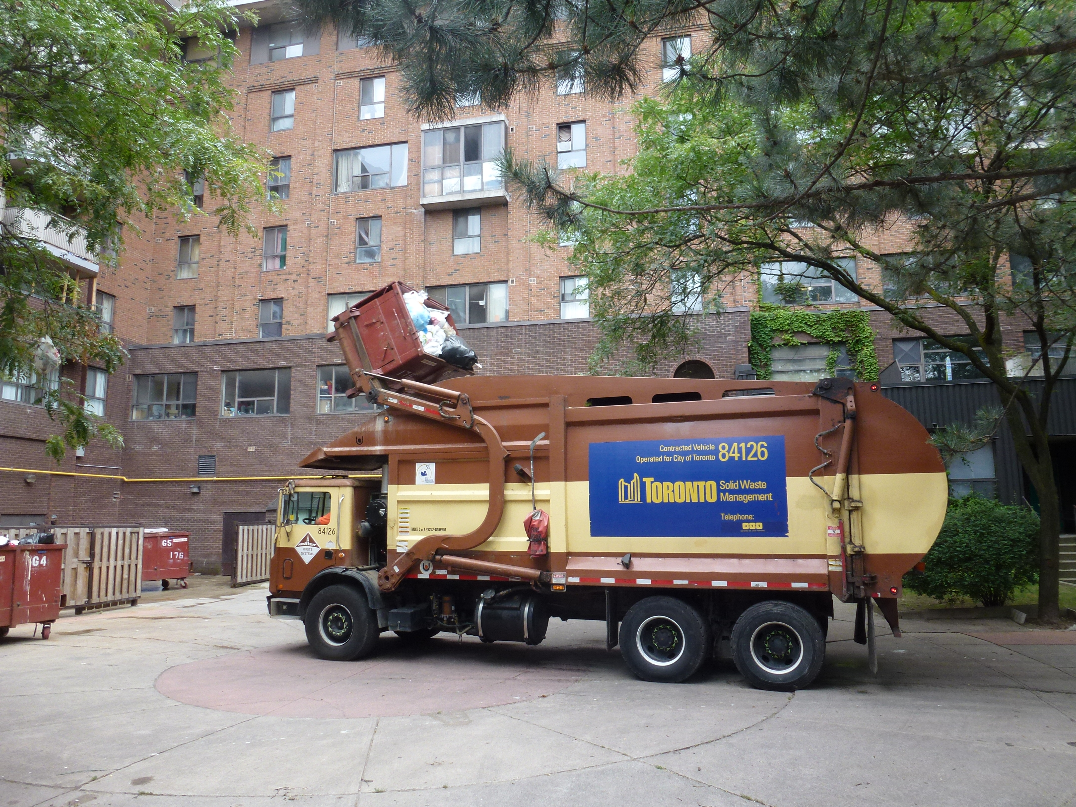 Emptying a garbage bin.